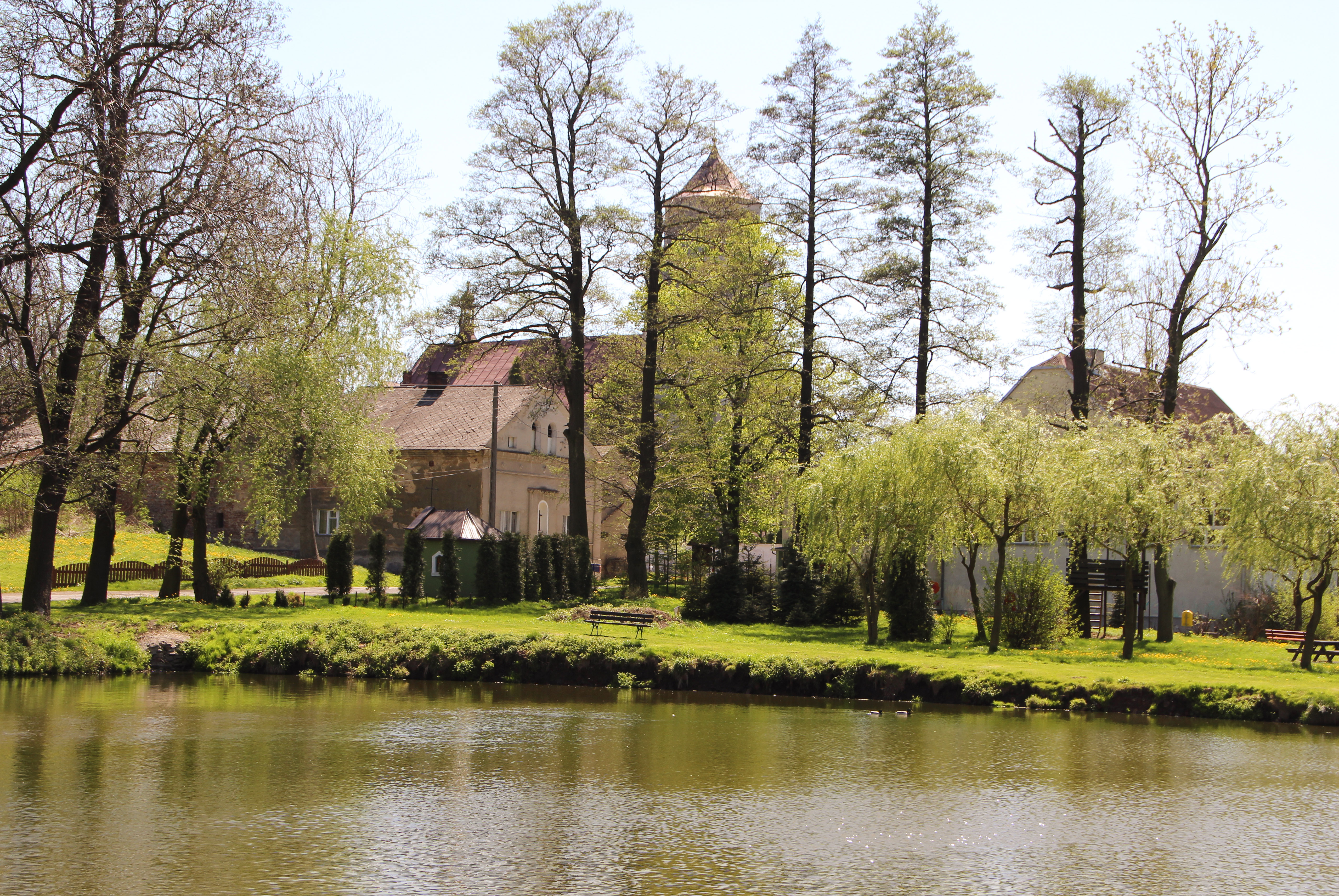 Pilszcz – kościół pątniczy parafialny pw. Wniebowzięcia NMP, z 1593 r. - XVI wieku, 1777 r., stanowiący obecnie sanktuarium Matki Boskiej Pilszczańskiej.